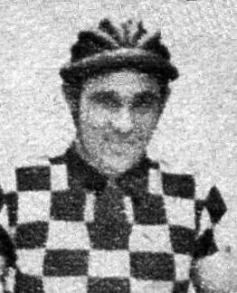 Camille Danguillaume en novembre 1943 (Vel'Div').